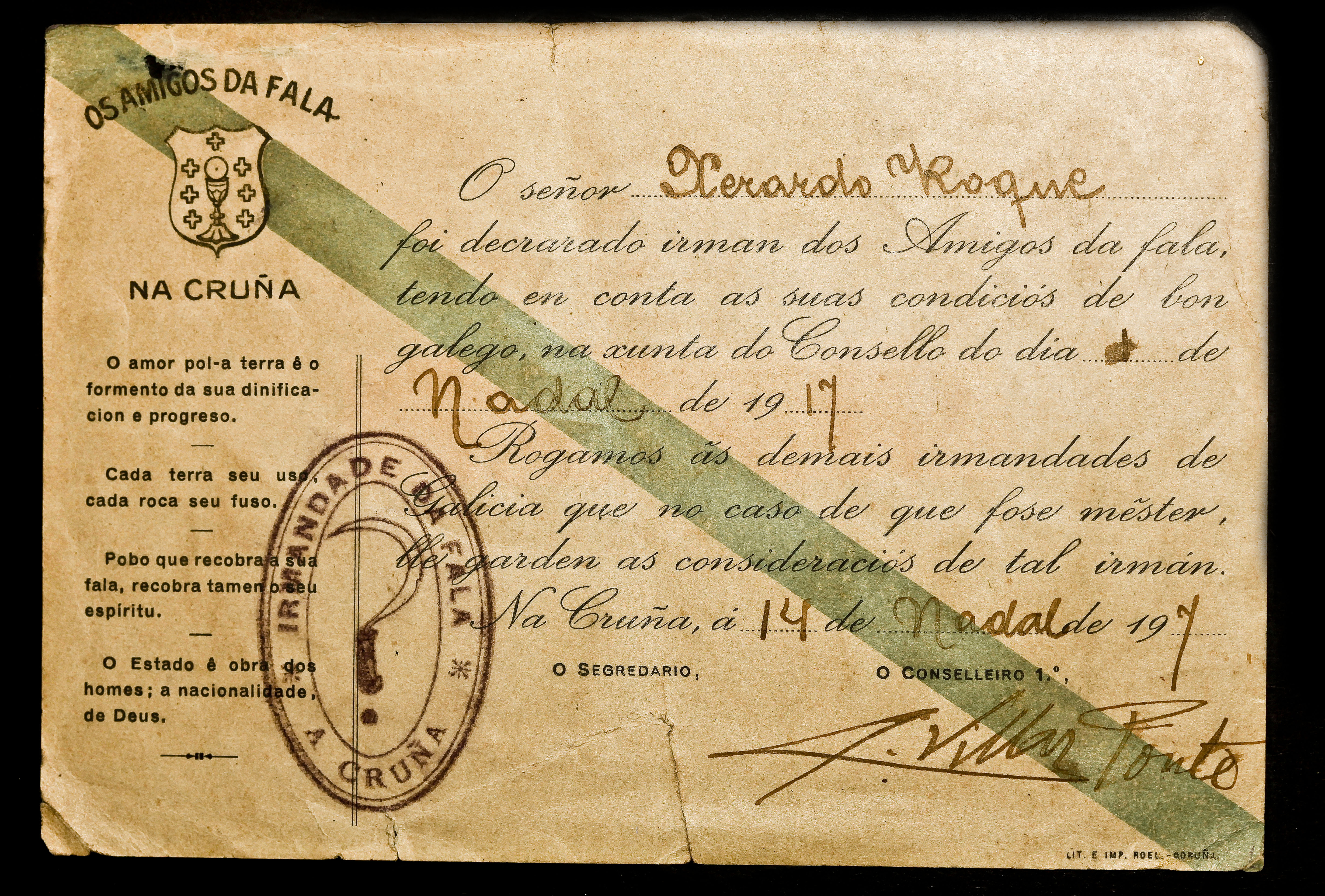 Carnet de afiliado das Irmandades da Fala do xornalista galego Xerardo Roque. Está asinado por Antón Villar Ponte. Galiza